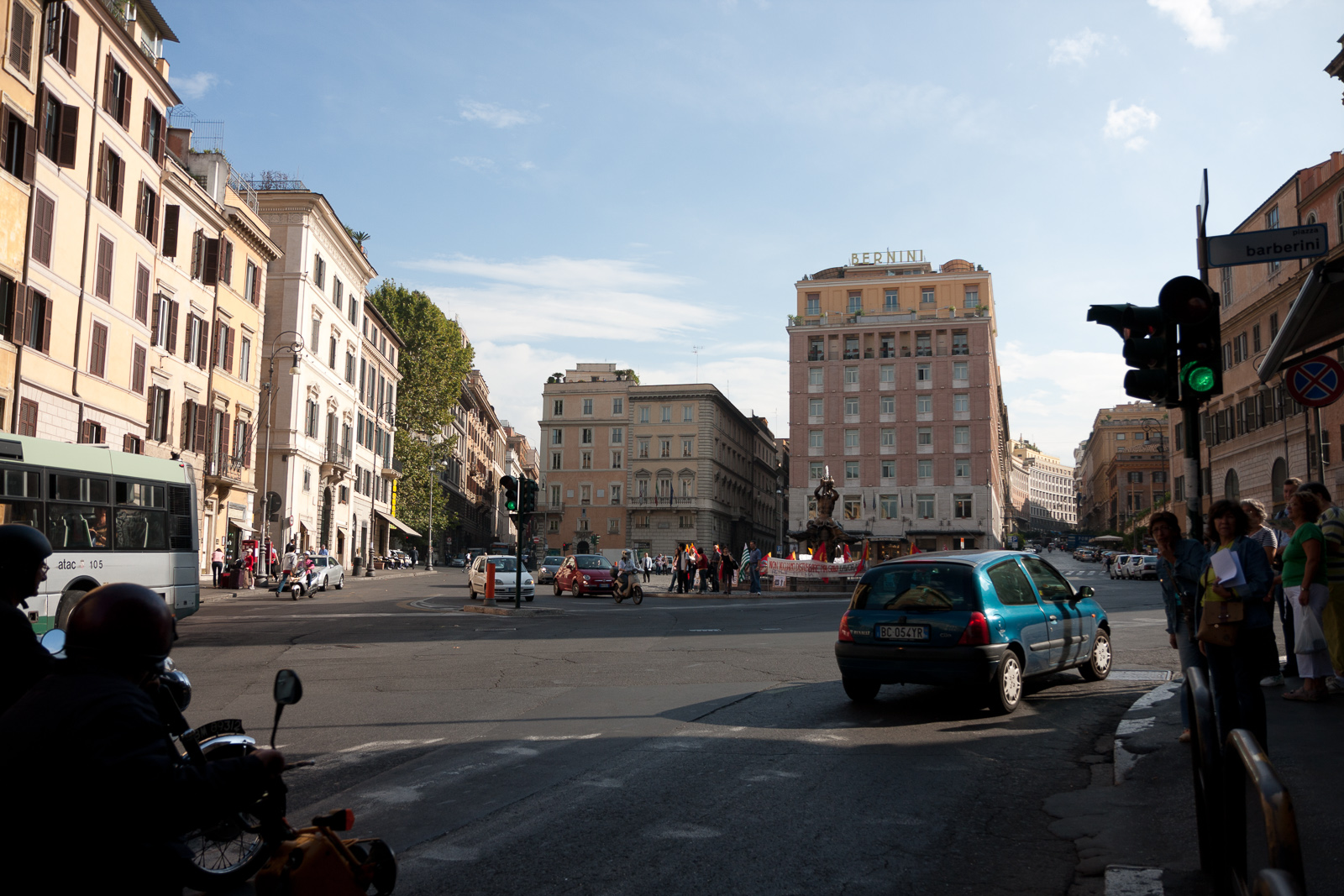 Rione II Trevi, 00187 Roma, Italy